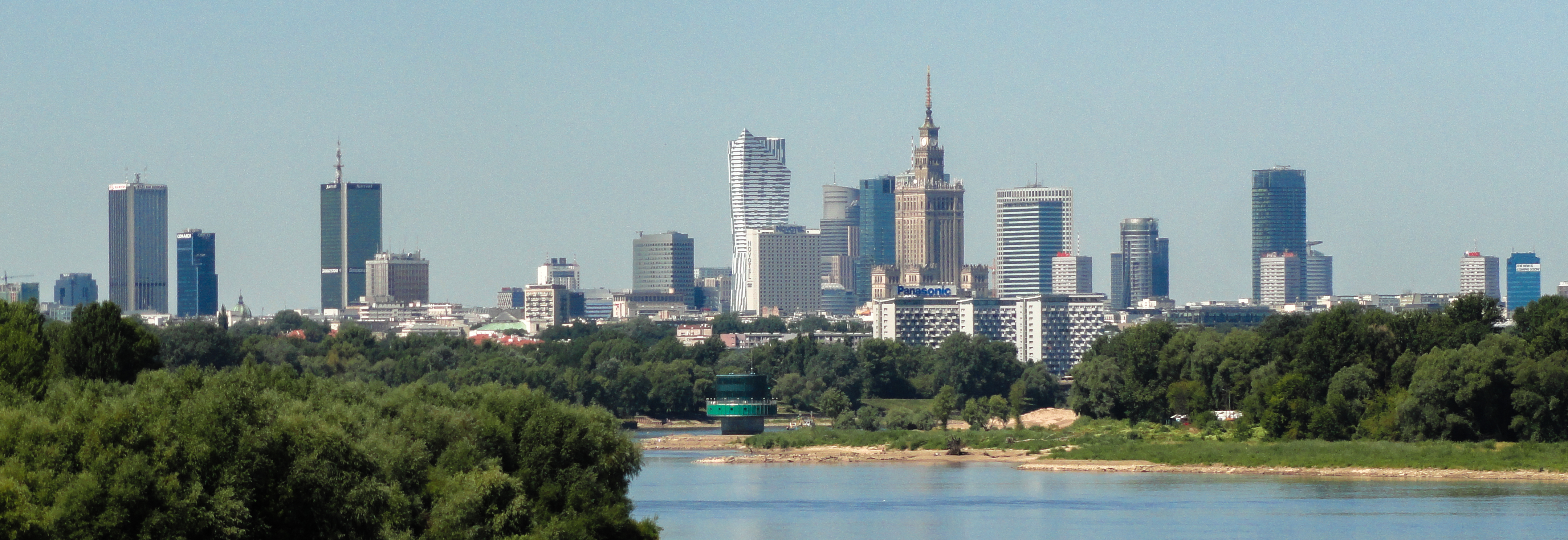 Panorama centrum Warszawy z Mostu Siekierkowskiego.